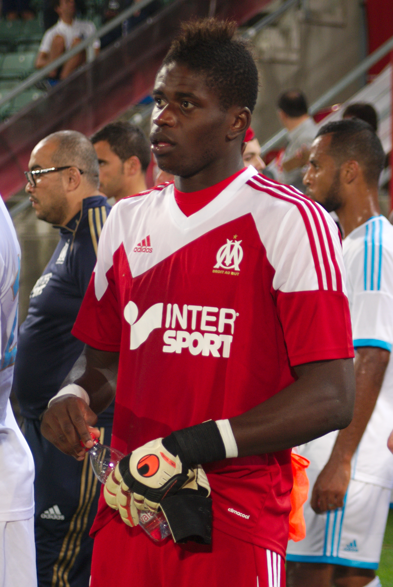 Valais Cup 2013 - OM-FC Porto - 20130713 - Brice Samba